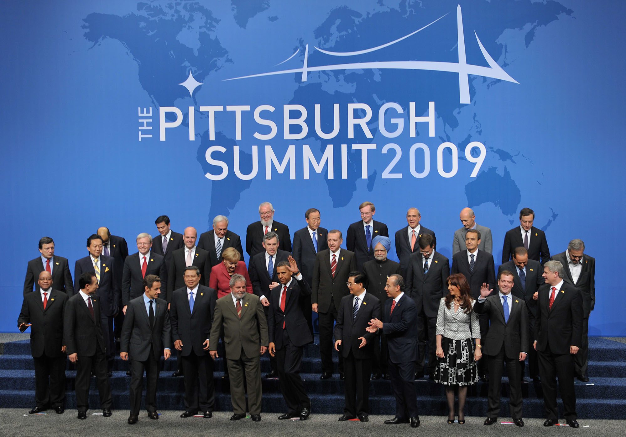 Foto oficial de la Cumbre del G-20 en Pittsburgh